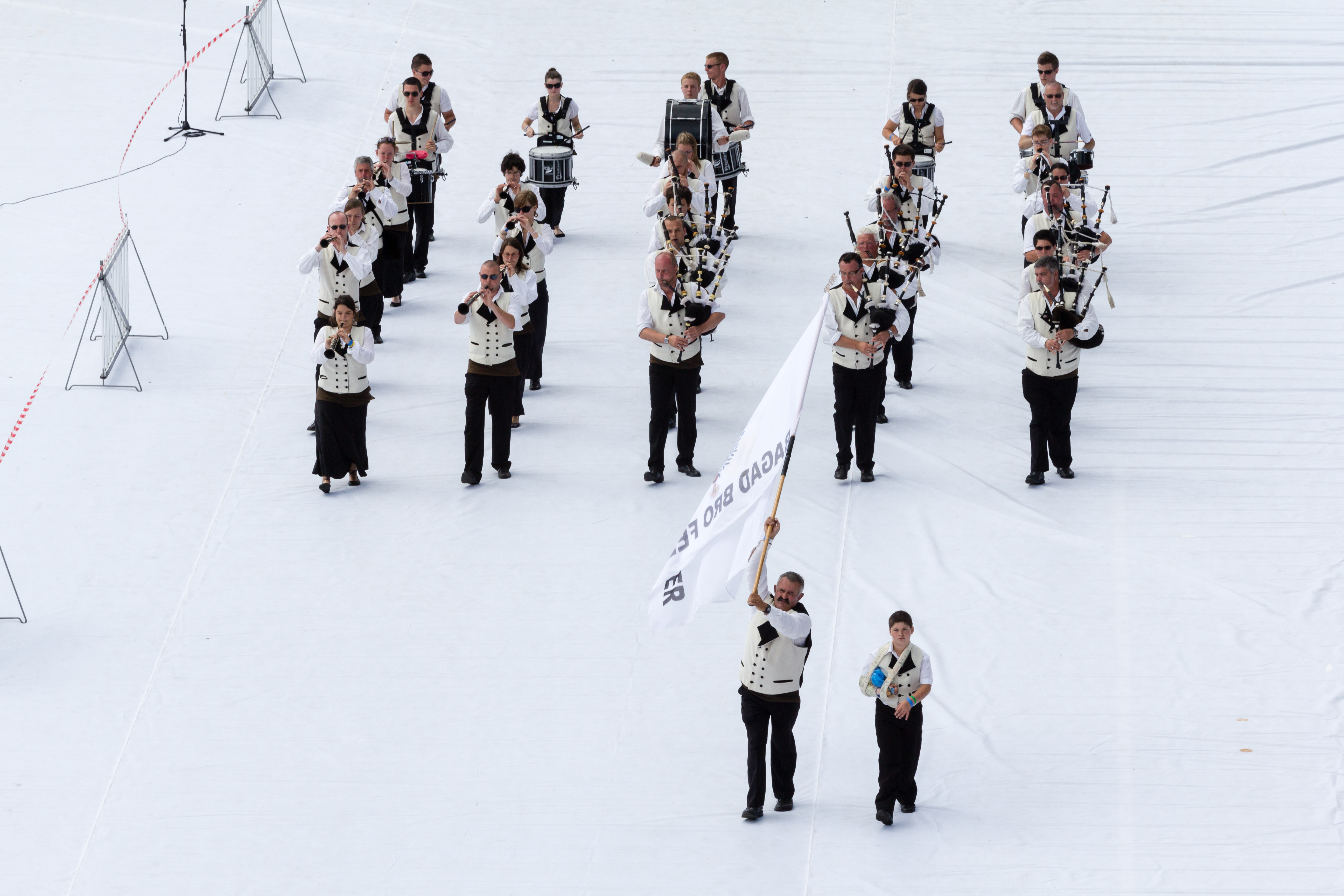 FIL 2012 - Arrivée de la grande parade des nations celtes - Bagad bro Felger